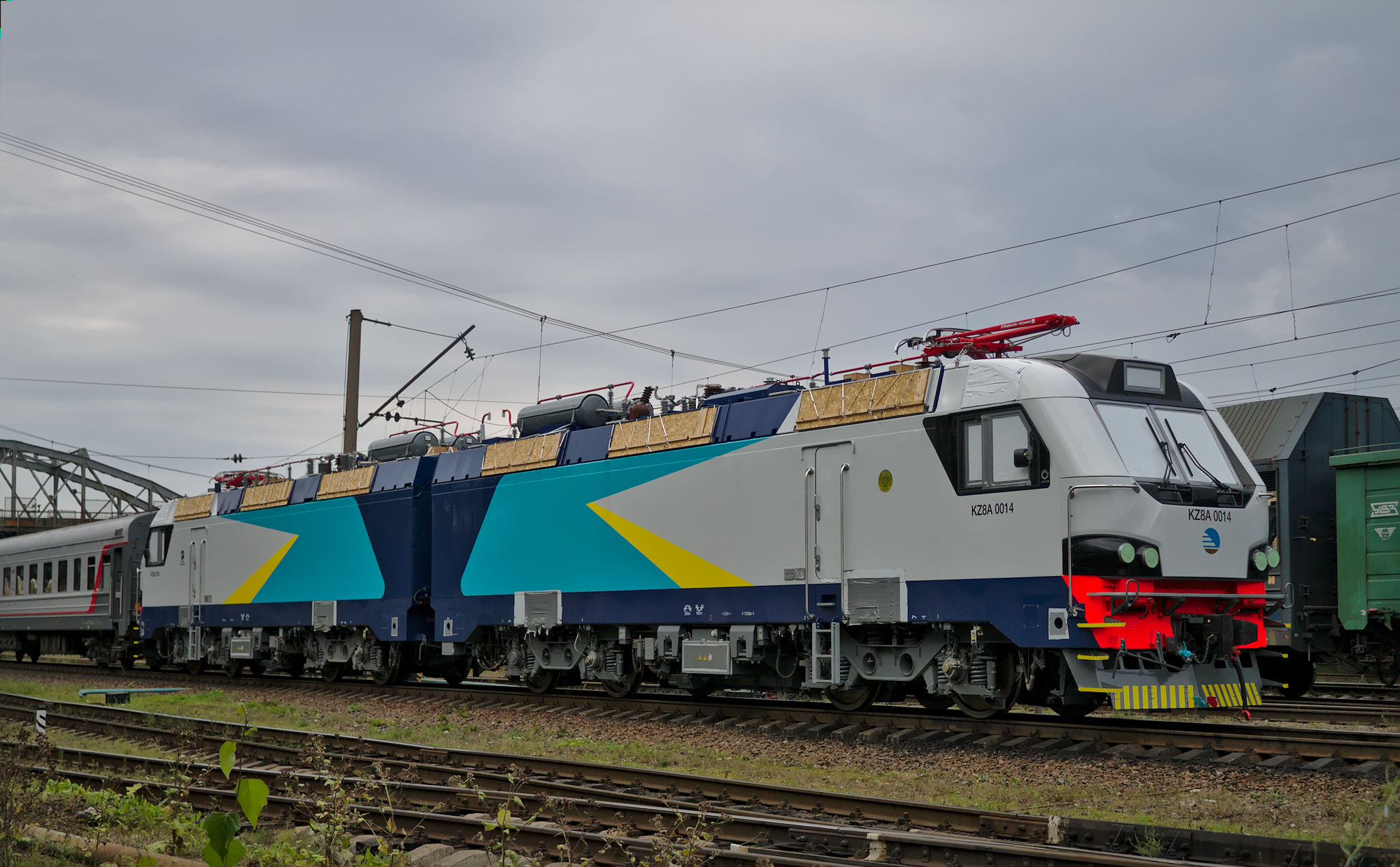 KZ8A-0014, Санкт-Петербург-Сортировочный-Московский. см. фото 527853 в альбоме автора